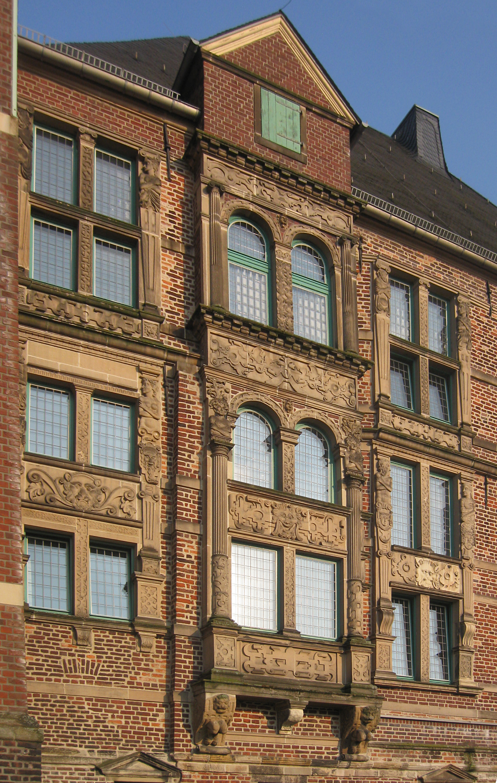 Schloss Horst, Turfstraße in Gelsenkirchen: Erker (Westflügel)